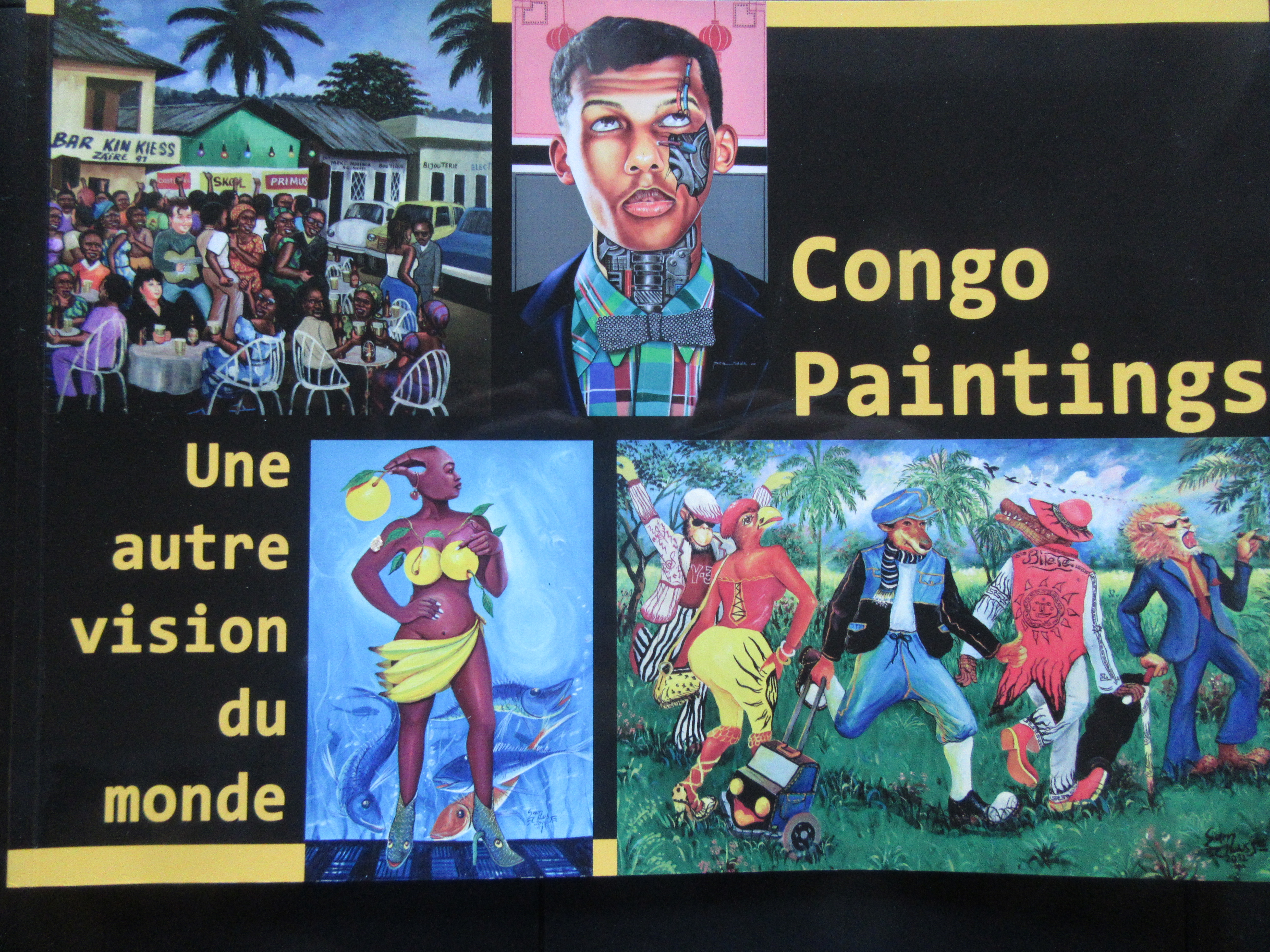 Exposition de peinture au Musée africain de Namur